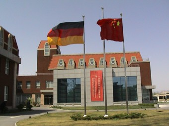 Ansicht des Chinesisch-Deutschen Zentrums für Wissenschaftsförderung